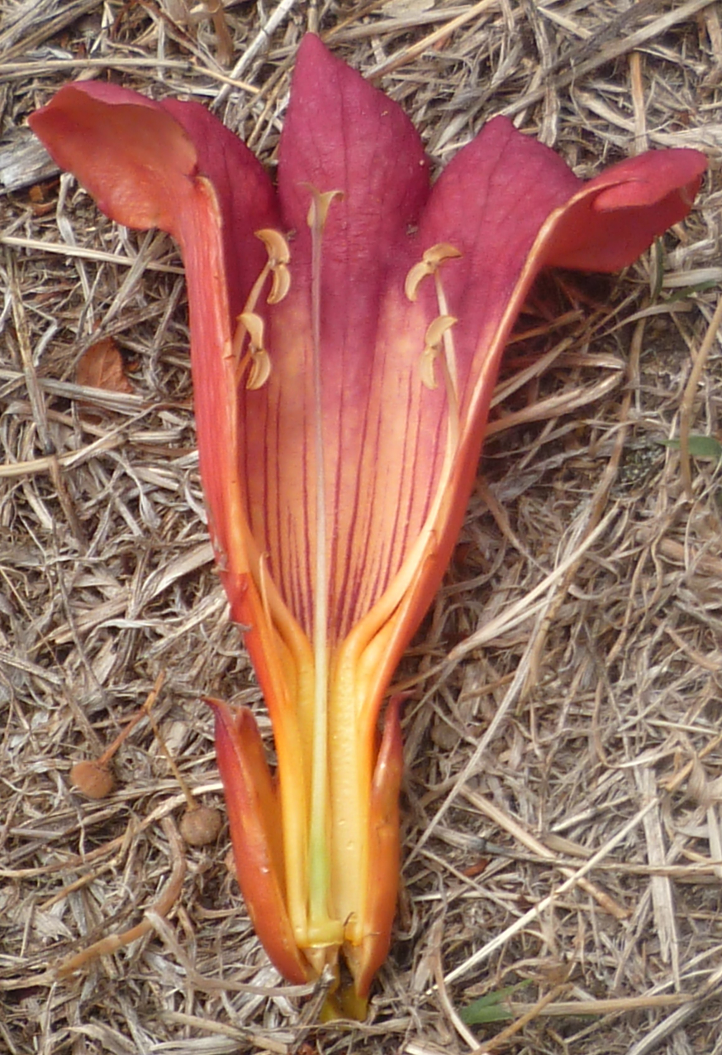 Fleur de Campsis radicans ouverte afin de visualiser les organes reproducteurs